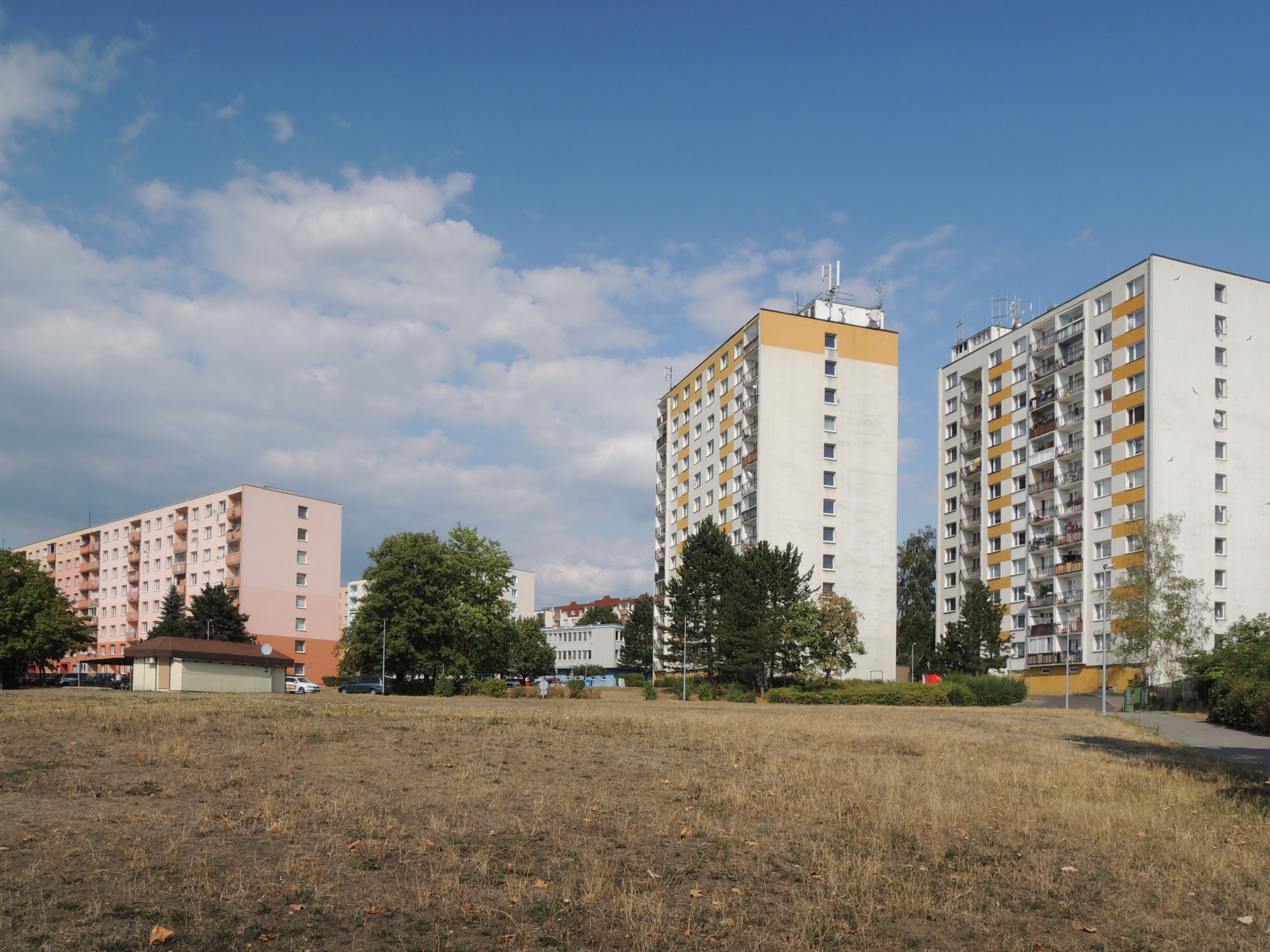 Volná plocha v parku, za ní věžáky v ulici Stavbařů a paneláky v ulici Zvonková